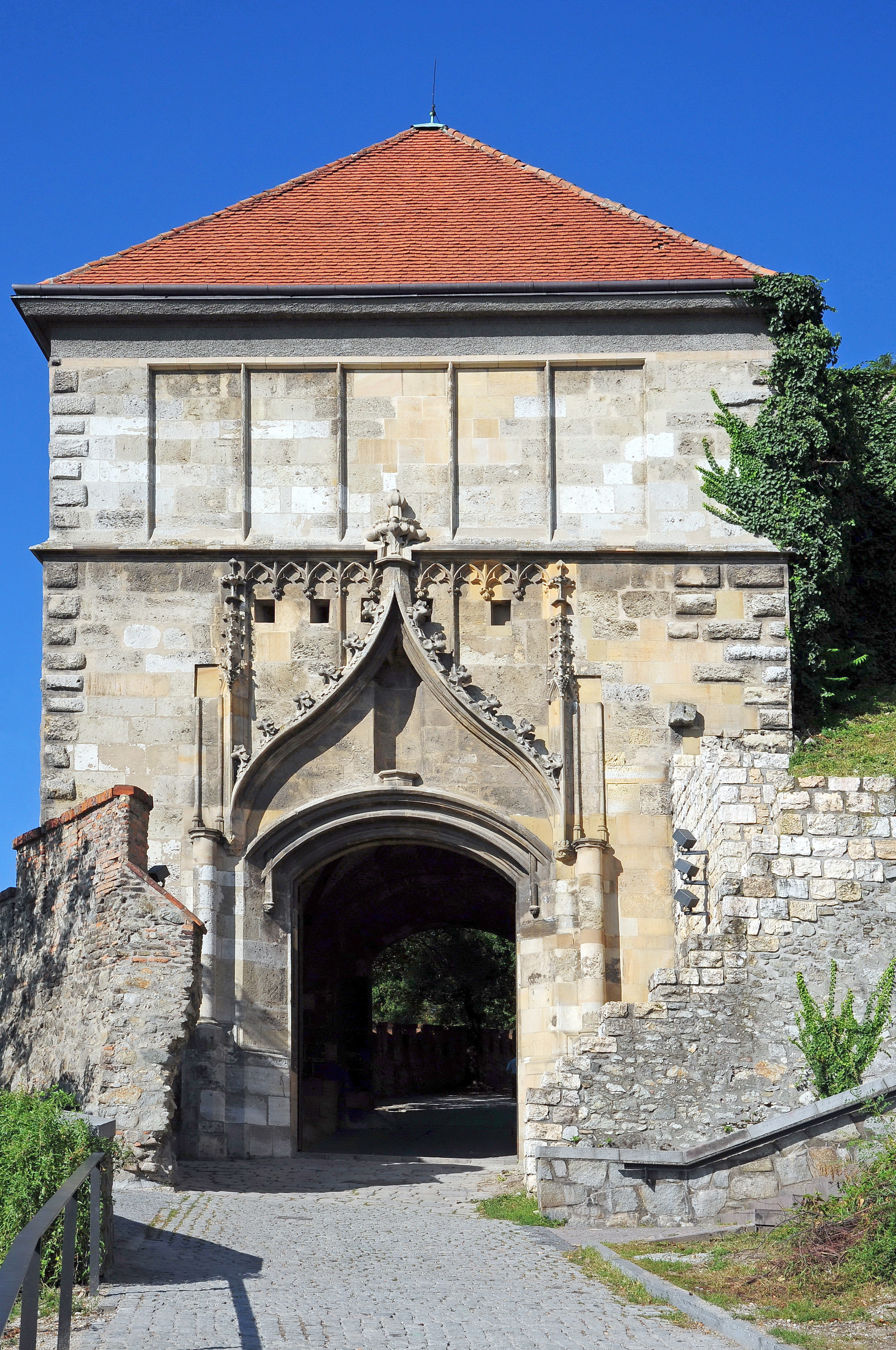 Bratislava, Žigmundova brána This medium shows the protected monument with the number 101-28/23 in the Slovak Republic.